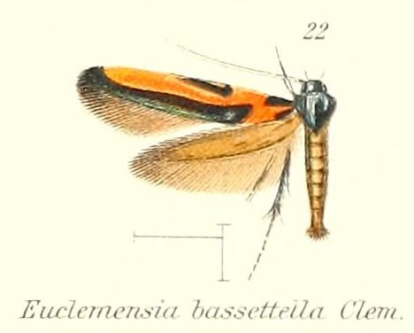 Euclemensia bassettella